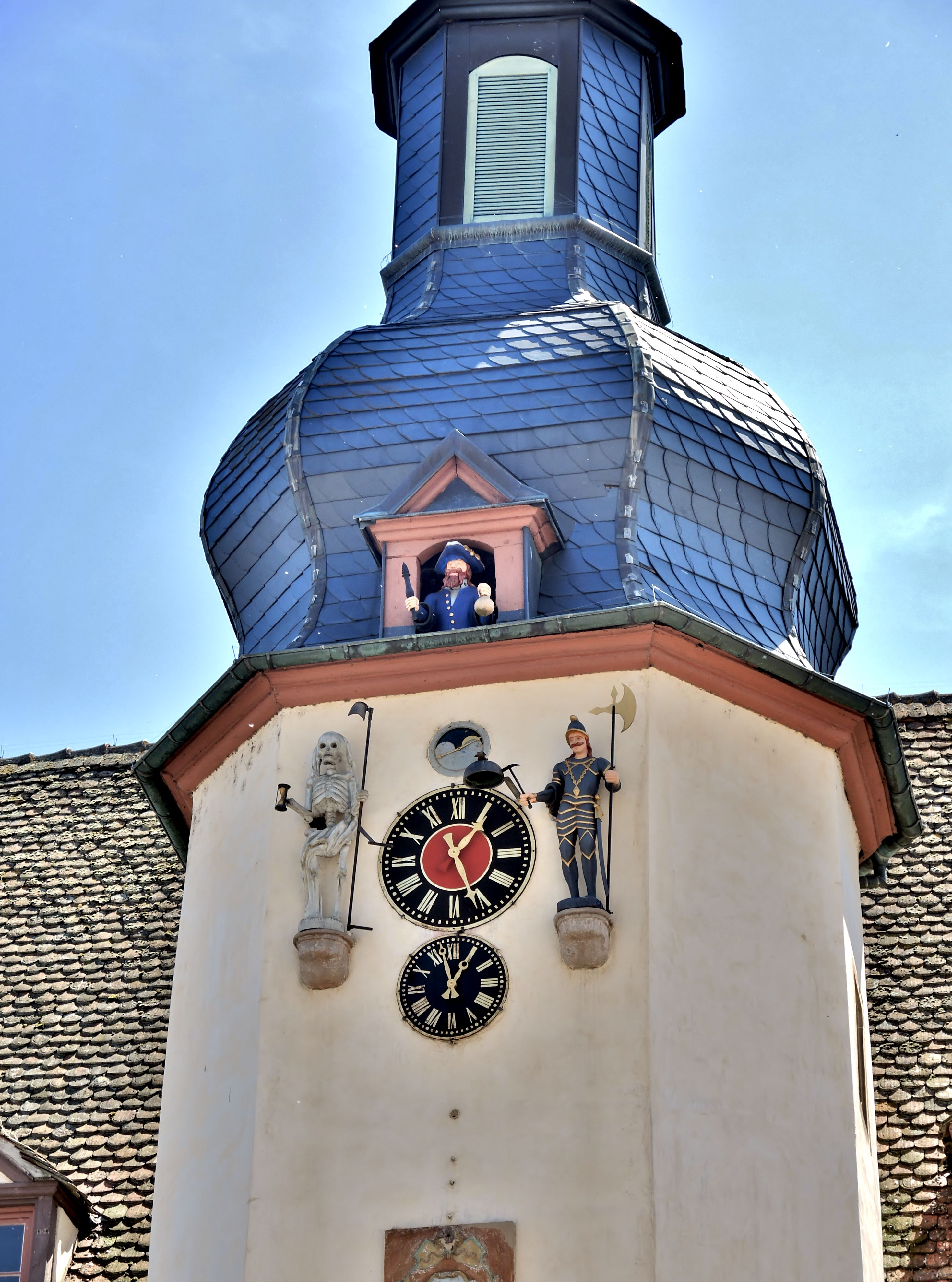 Jacquemart de la mairie de Benfeld. Bas-Rhin